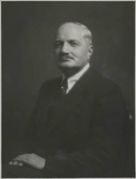 Ginecologo e accademico italiano